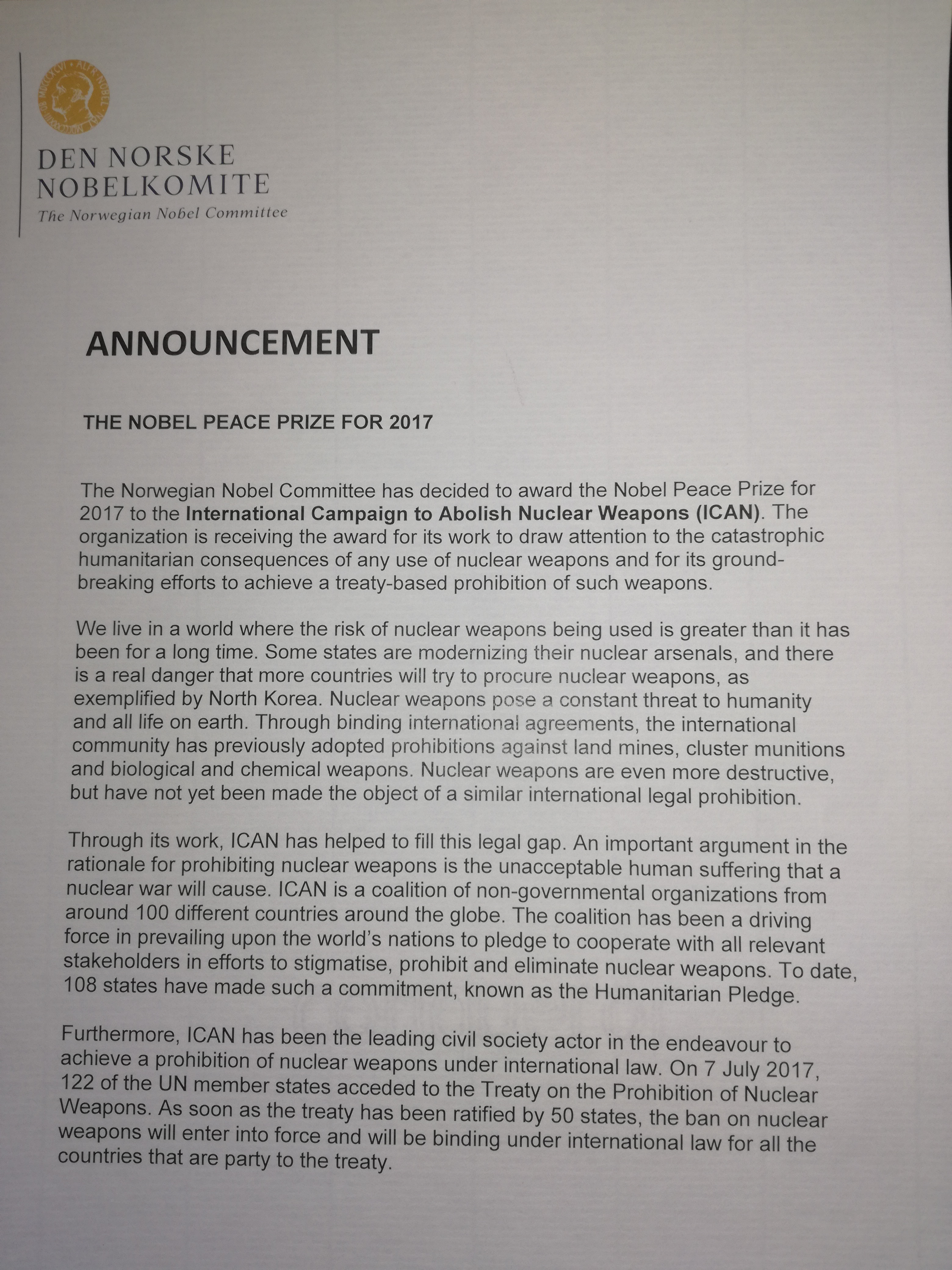 Announcement for The Nobel Peace Prize for 2017